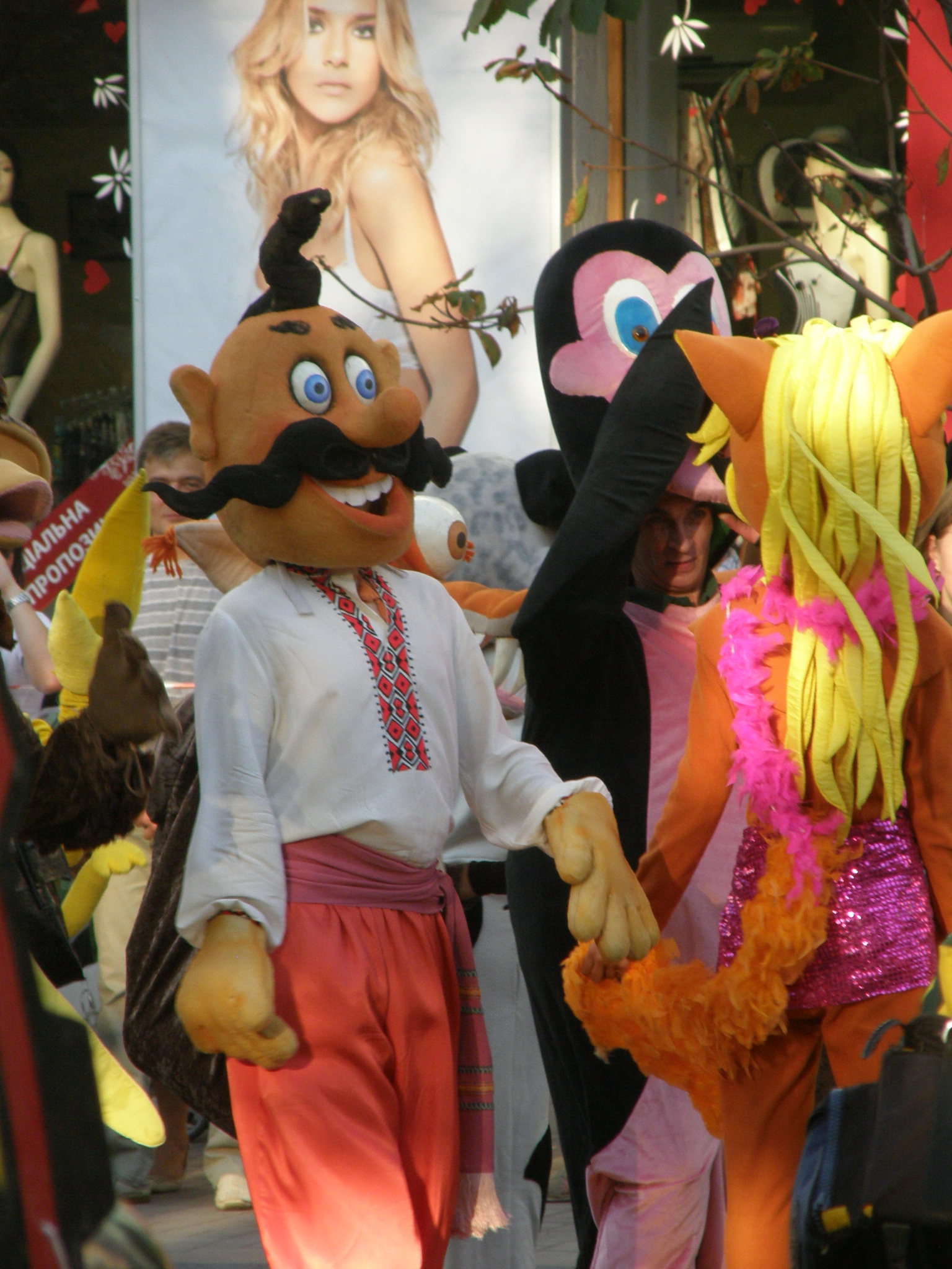 Донецк. Карнавал на день города.